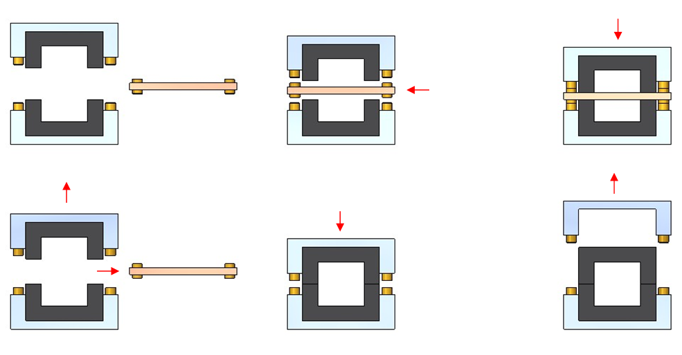 Proceso de soldadura de termoplásticos con placa caliente